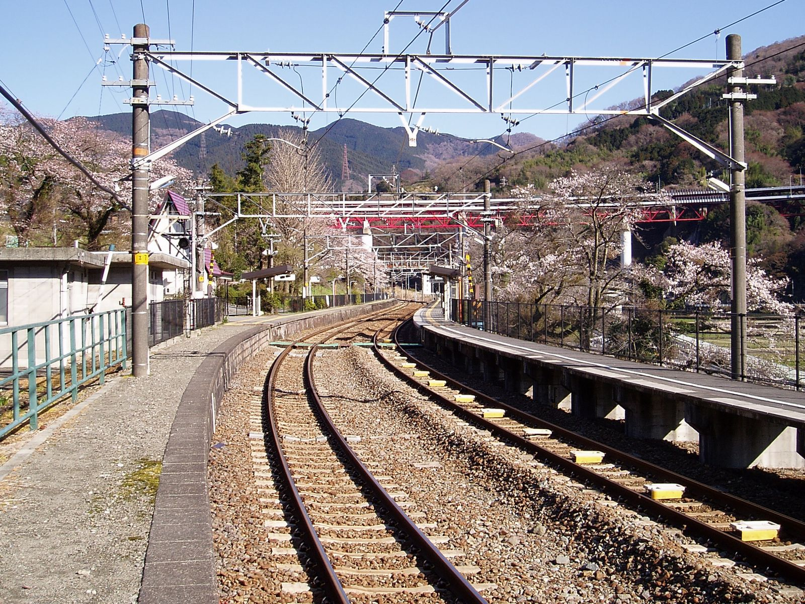 Central Japan Railway Company, Yaga Sta.